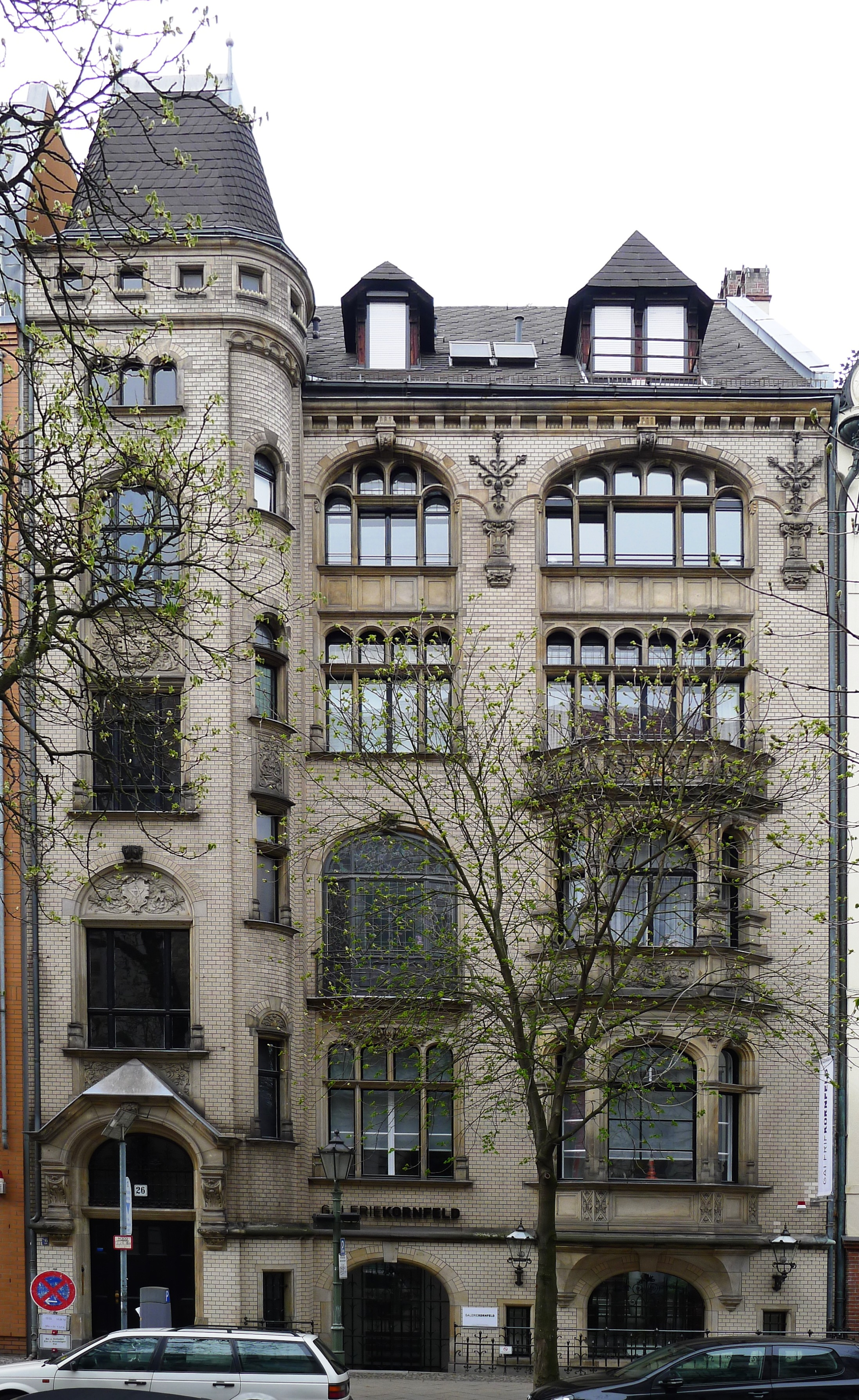 Mietshaus